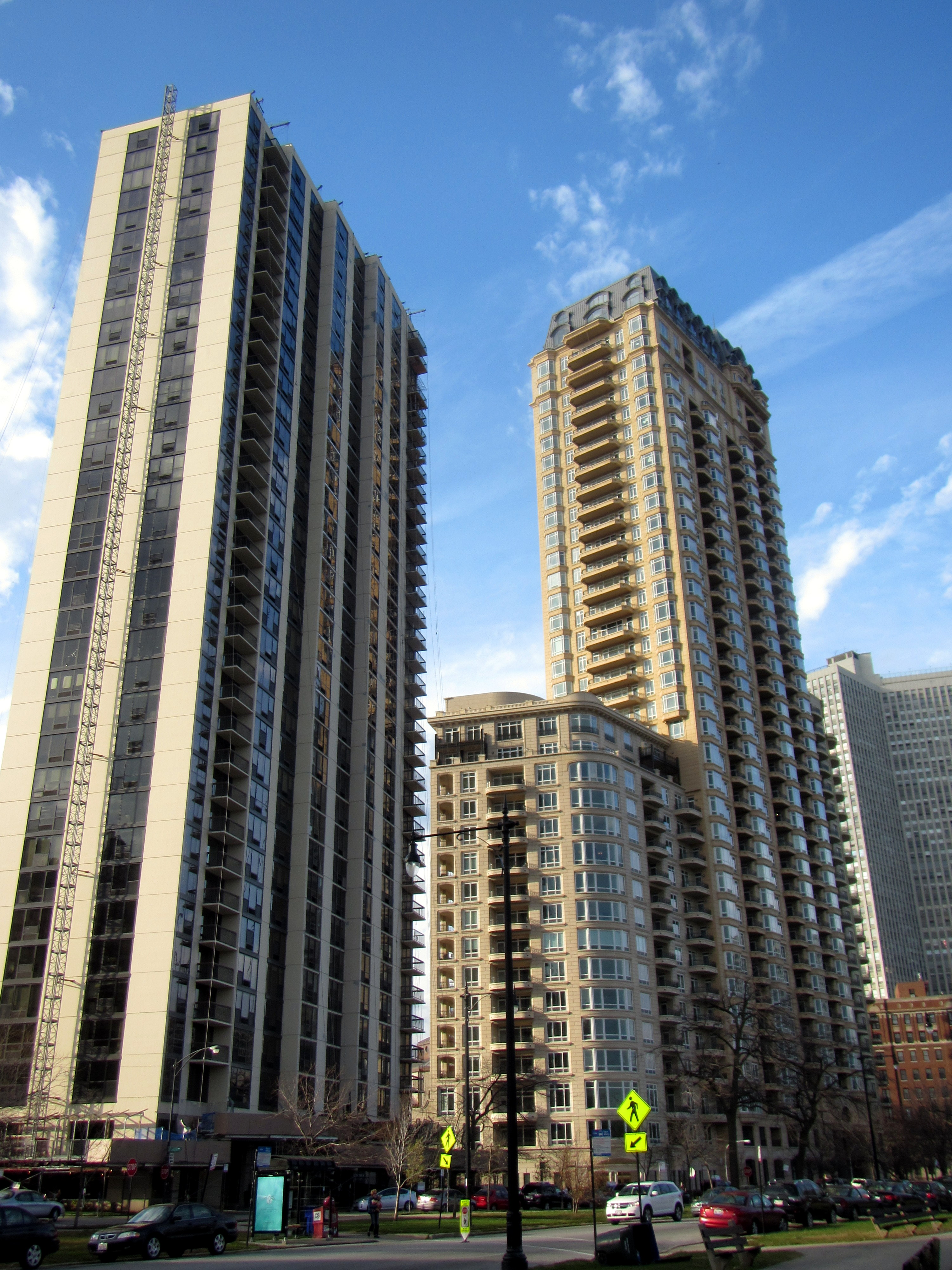 Residential Buildings in Lakeview - Apartamentos de gran altura en Lakeview